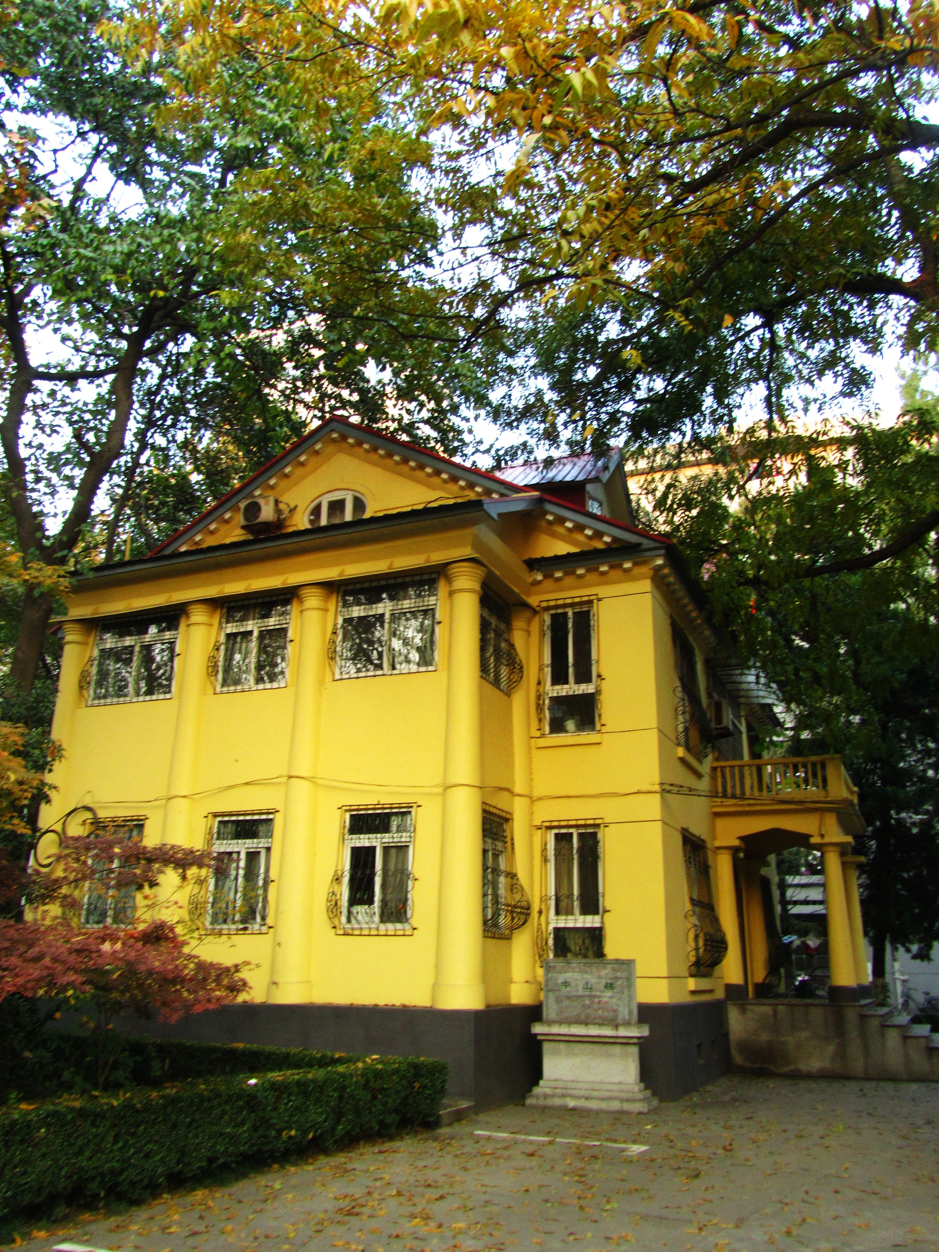 南京大学南园中山楼，修缮后。